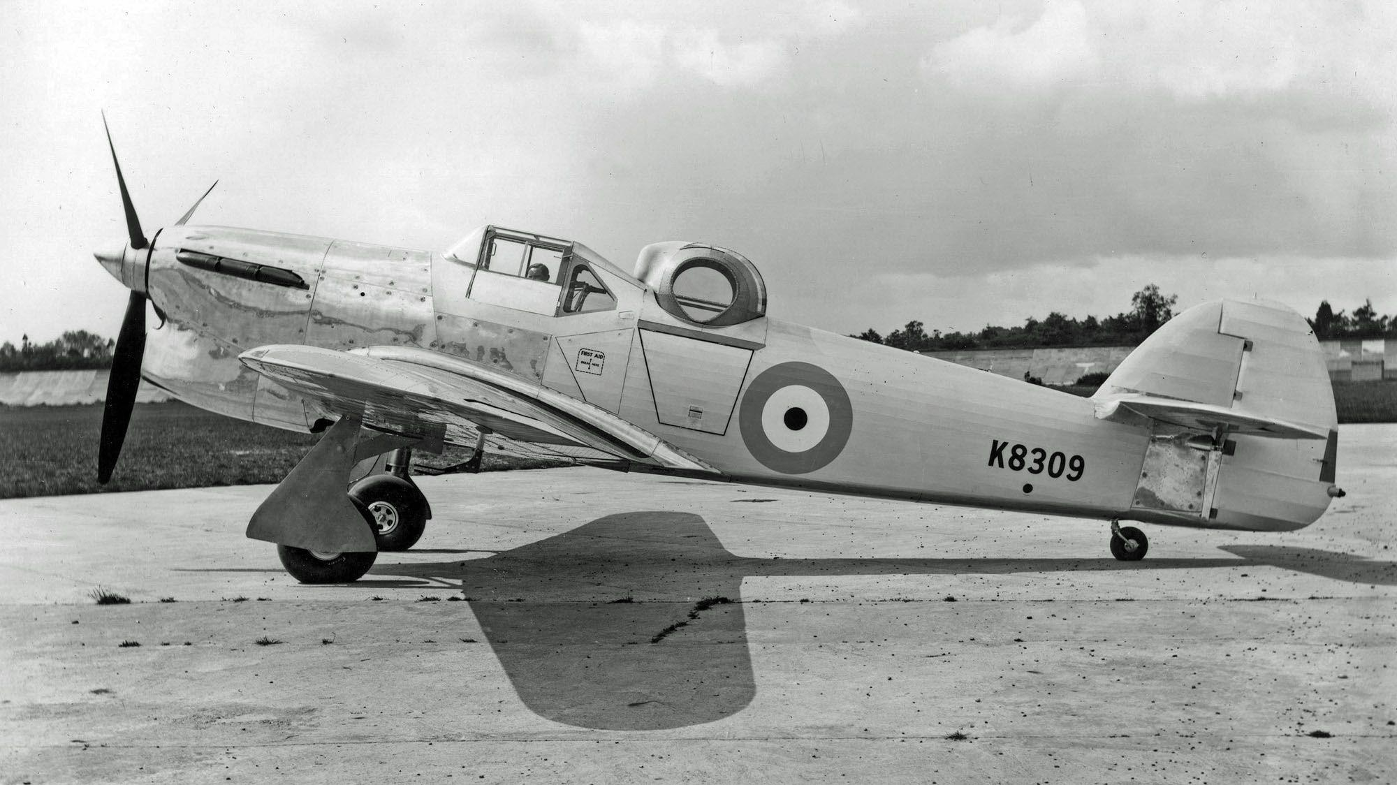 Foto di un Hawker Hotspur eseguita più di settanta anni fa e di proprietà della BAE Systems, che ha concesso il permesso di pubblicazione. L'immagine originale proviene da en.wiki:. È stata caricata da in data 18:07, 15 ottobre 2005.